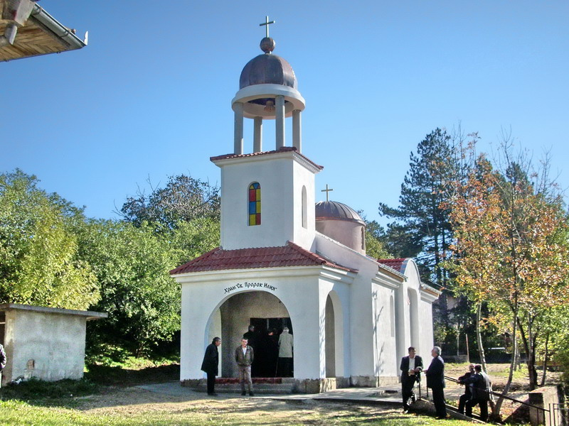 Село Долец, община Попово. Новопостроеният църковен храм в деня на неговото освещаване.